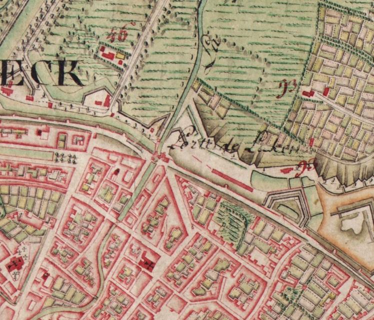 Extrait de la carte de Ferraris n° 76